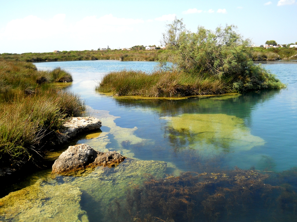 "Spunnulata" della Palude del Capitano.